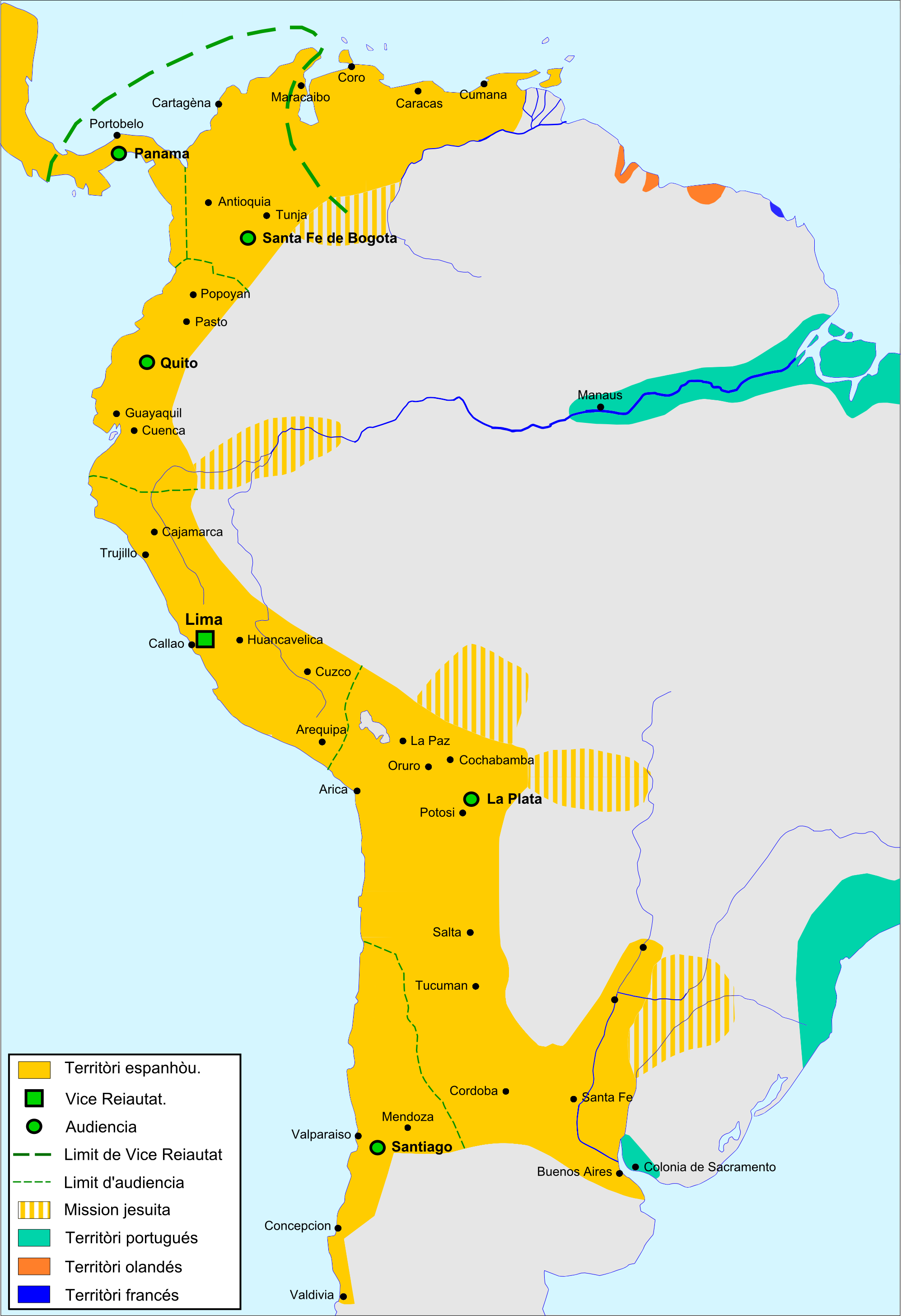 America dau Sud Espanhòla a la fin dau sègle XVII.